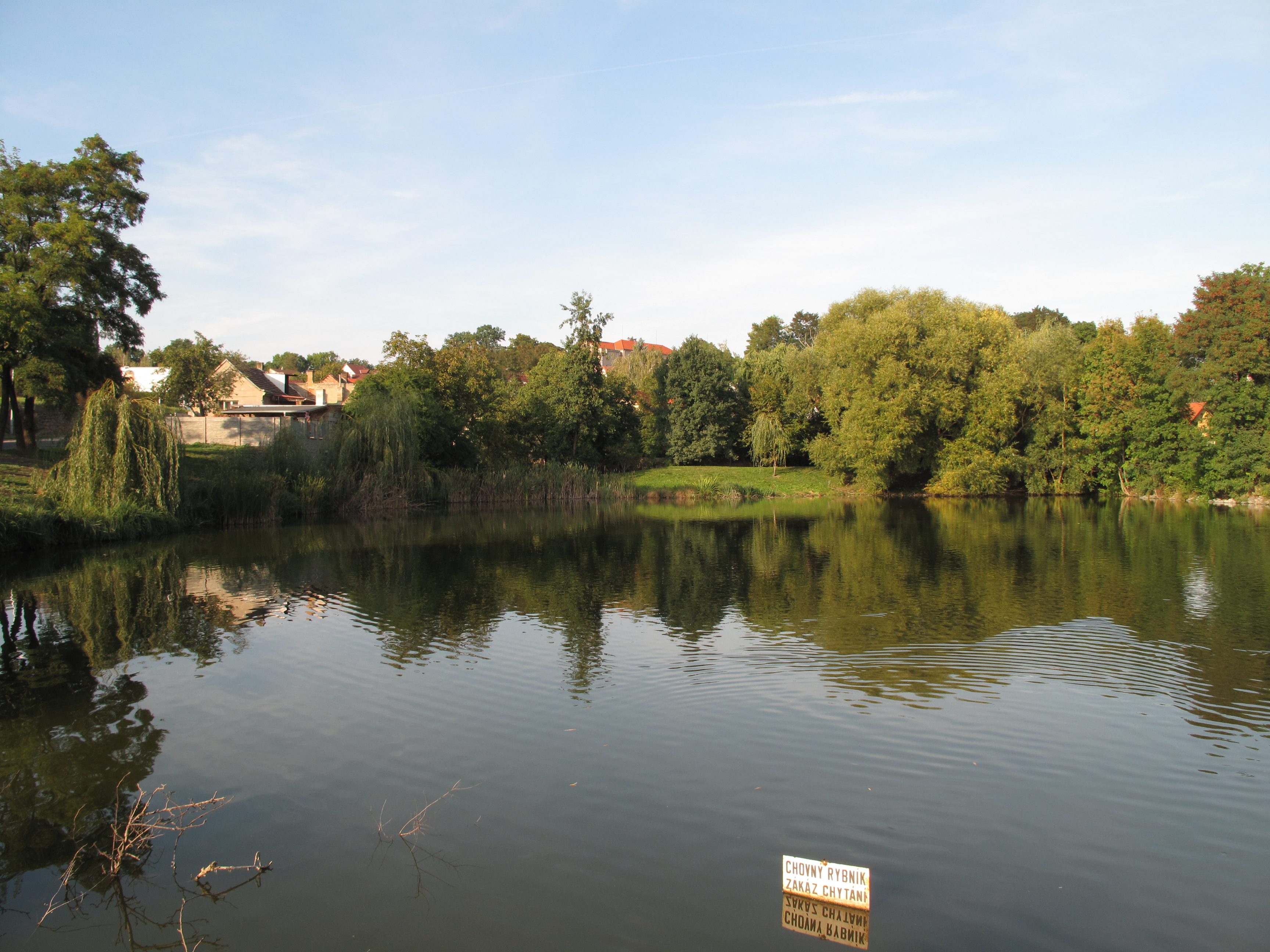 Chvalský rybník. Praha, Česká republika.